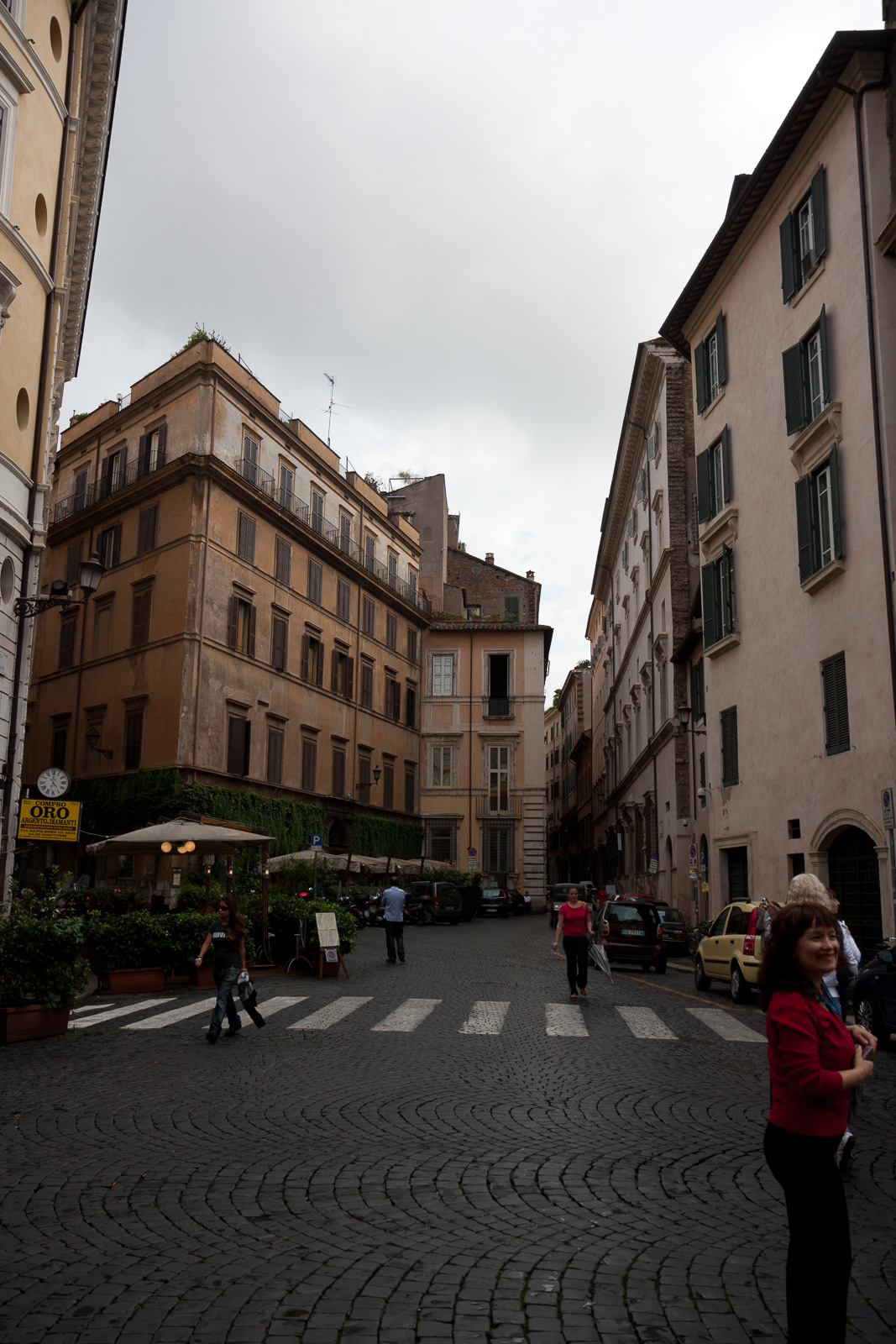 Rione VIII Sant'Eustachio, 00186 Roma, Italy